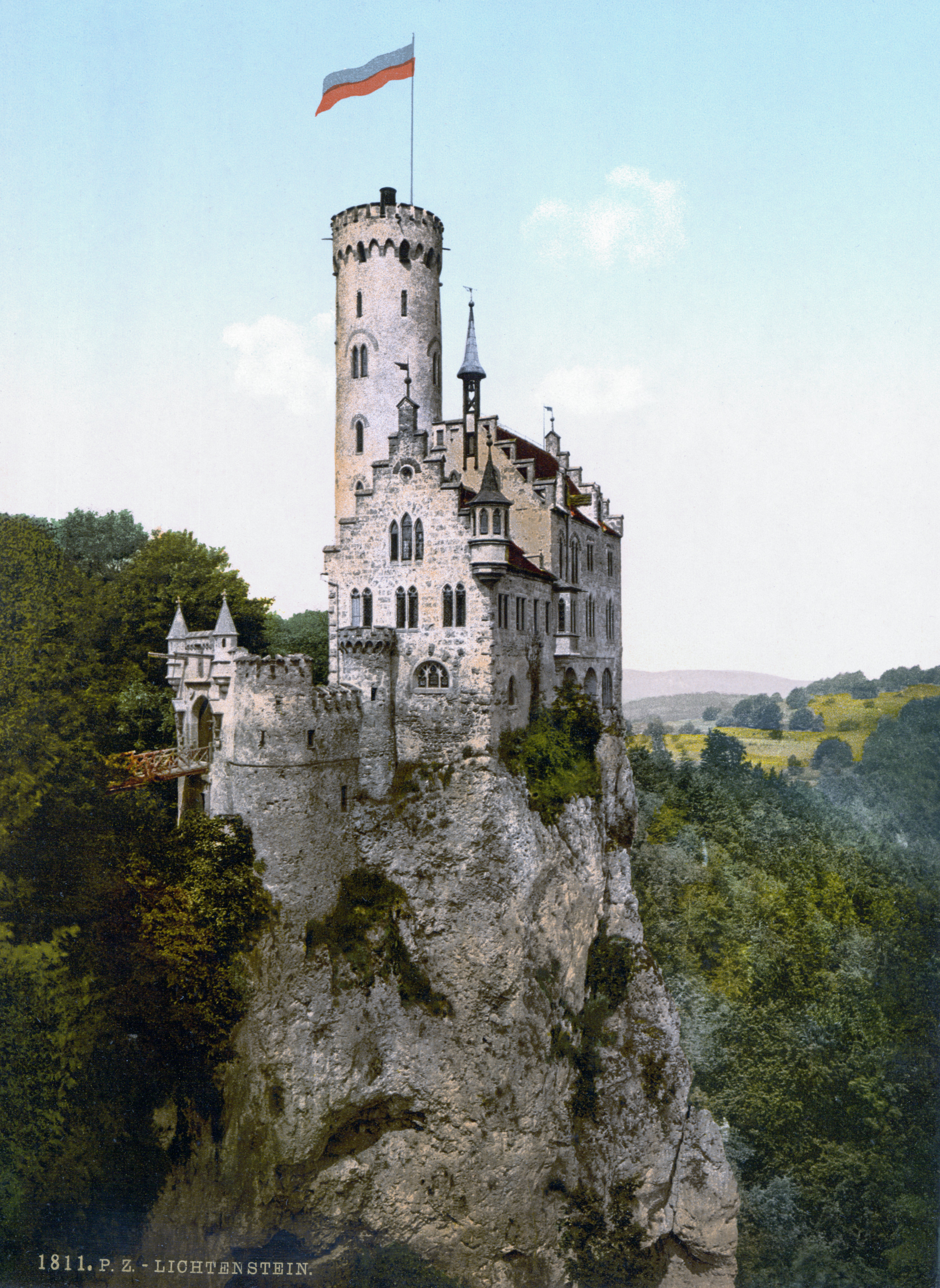 Schloss Lichtenstein